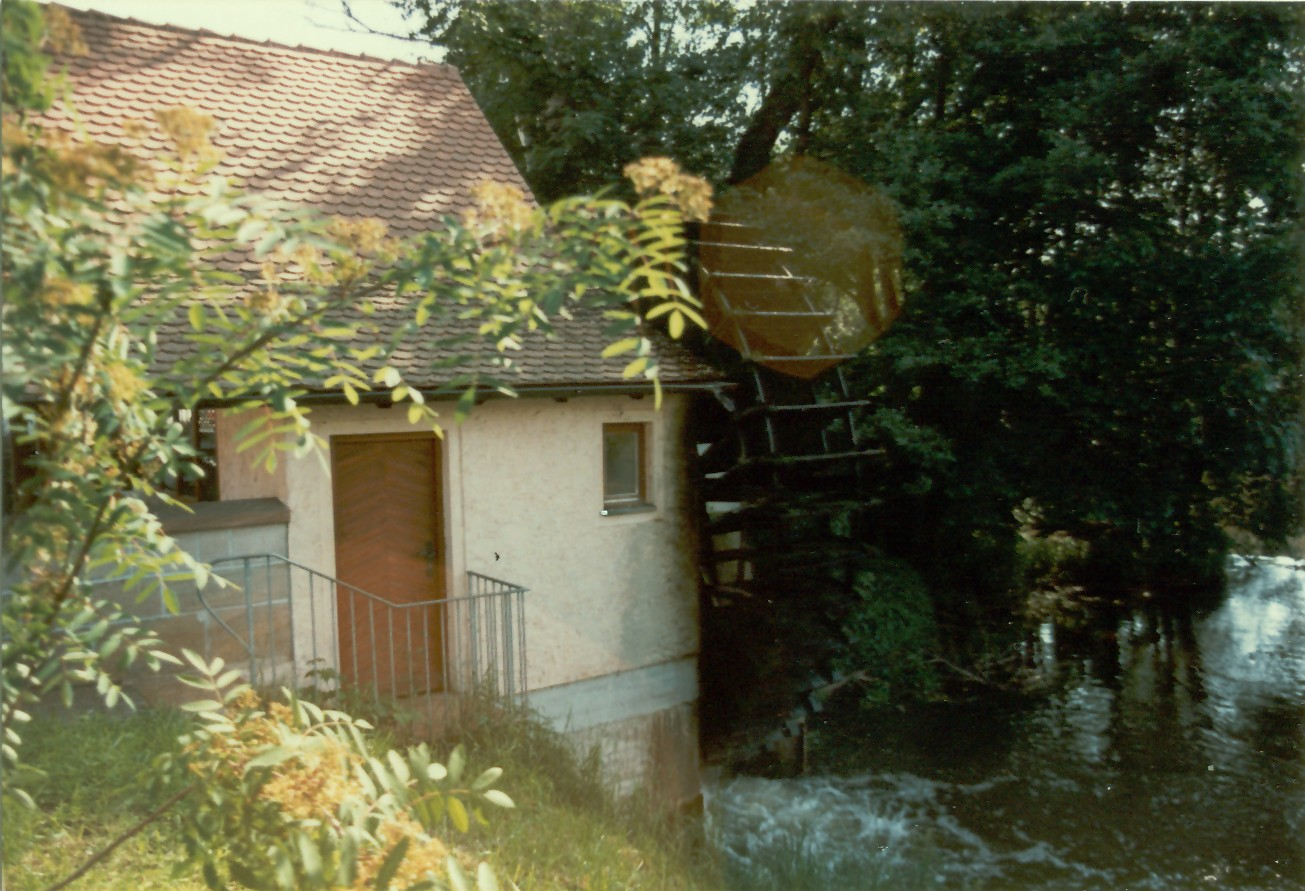 Wasserrad bei Georgensgmünd (Mittelfranken)